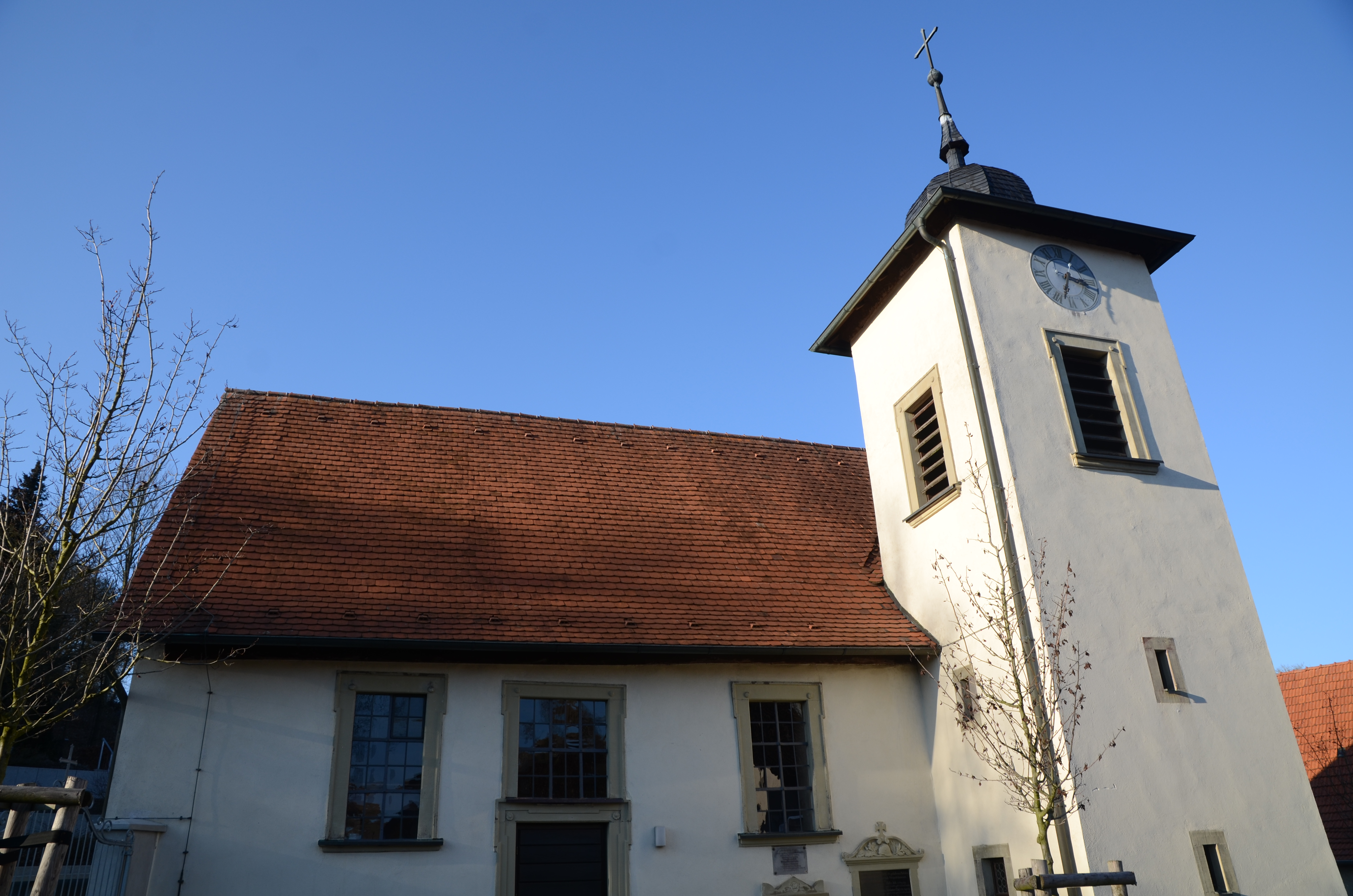 St. Bartholomäuskirche in Weipoltshausen